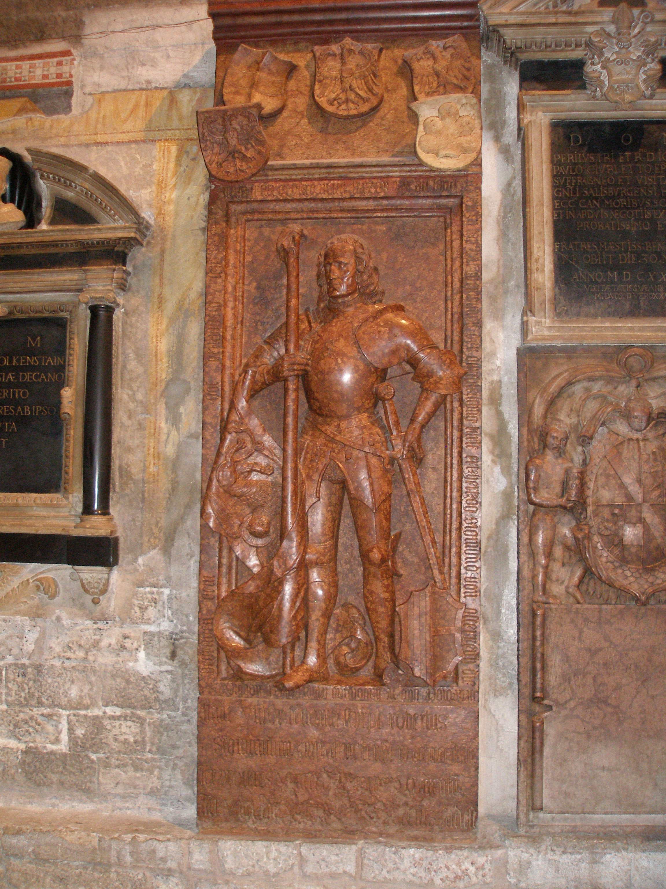 Trient Dom. Grabstein des 1487 gefallenen Roberto de Sanseverino (1493)